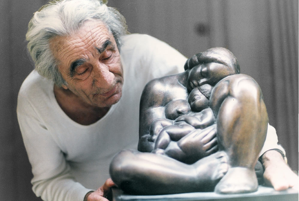 אהרון אשכנזי, נמסר על ידי בנו, רפי אשכנזי